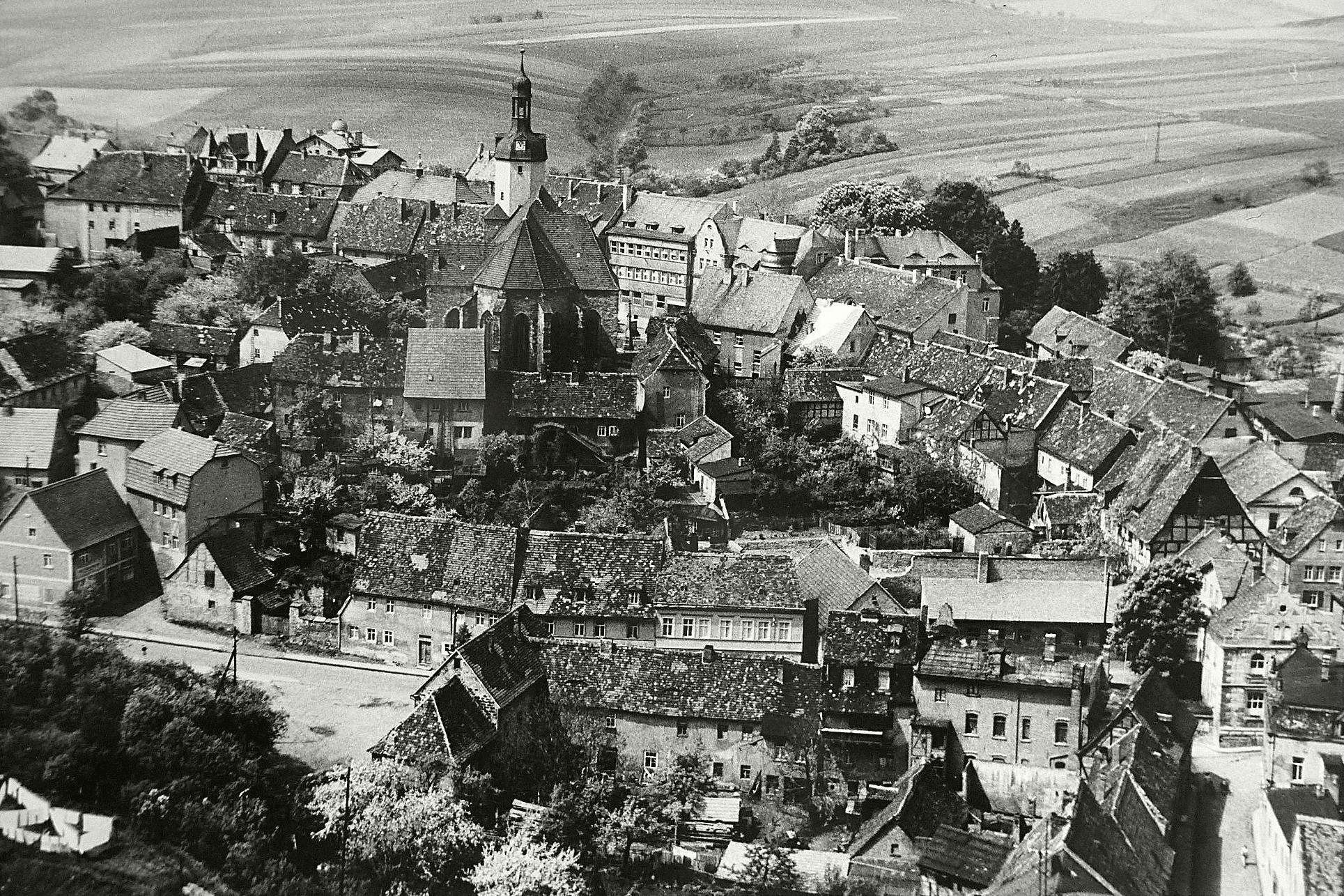 Mansfeld um das Jahr 1900